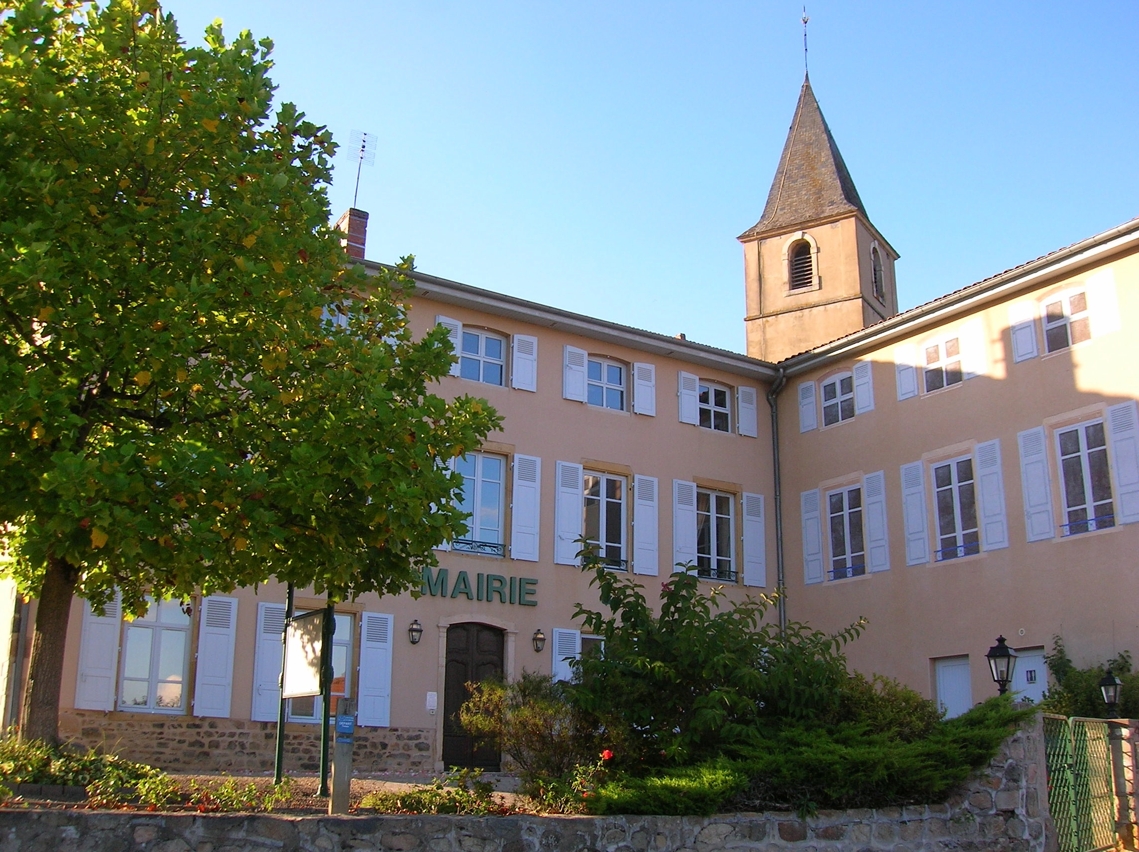 Mairie de Les Ardillats, France.